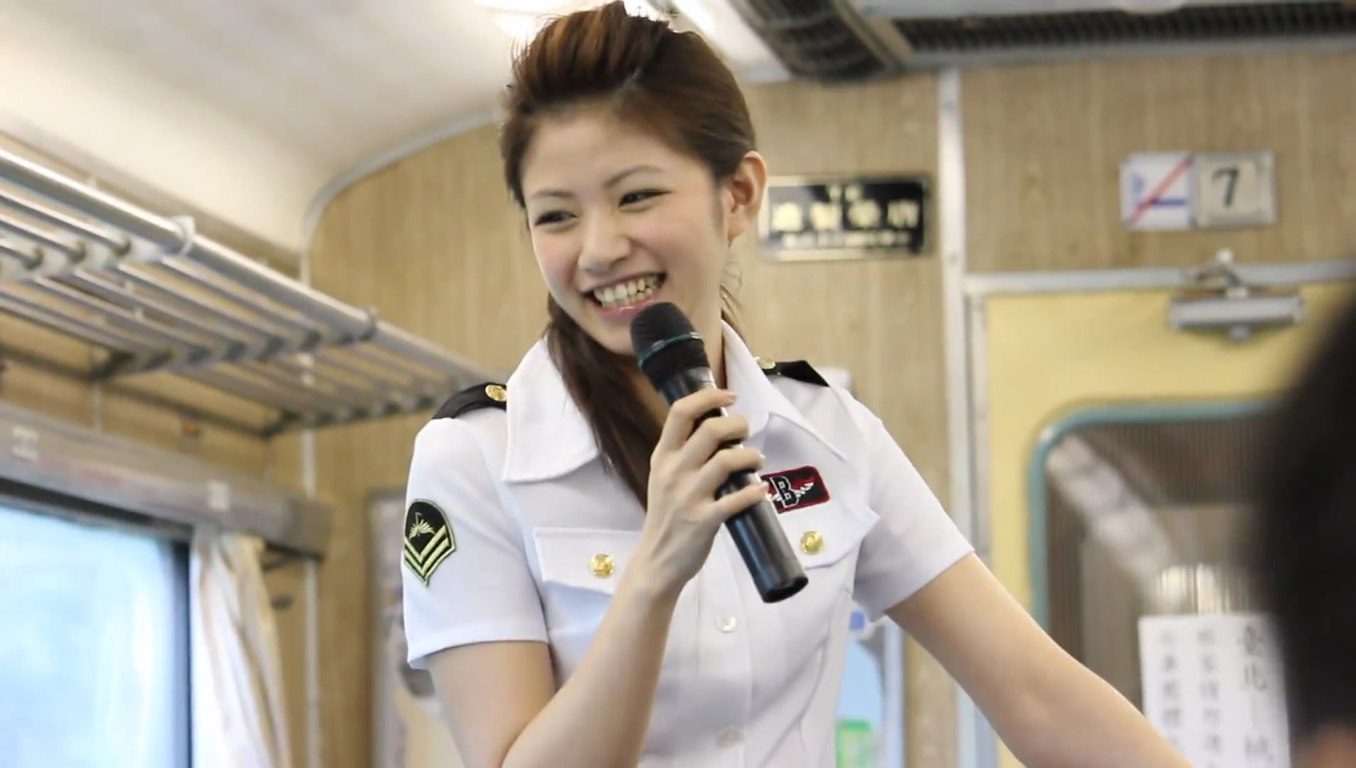 中文（台灣）: 李千娜在台北車站東三門口的尾班車歌迷見面同樂會